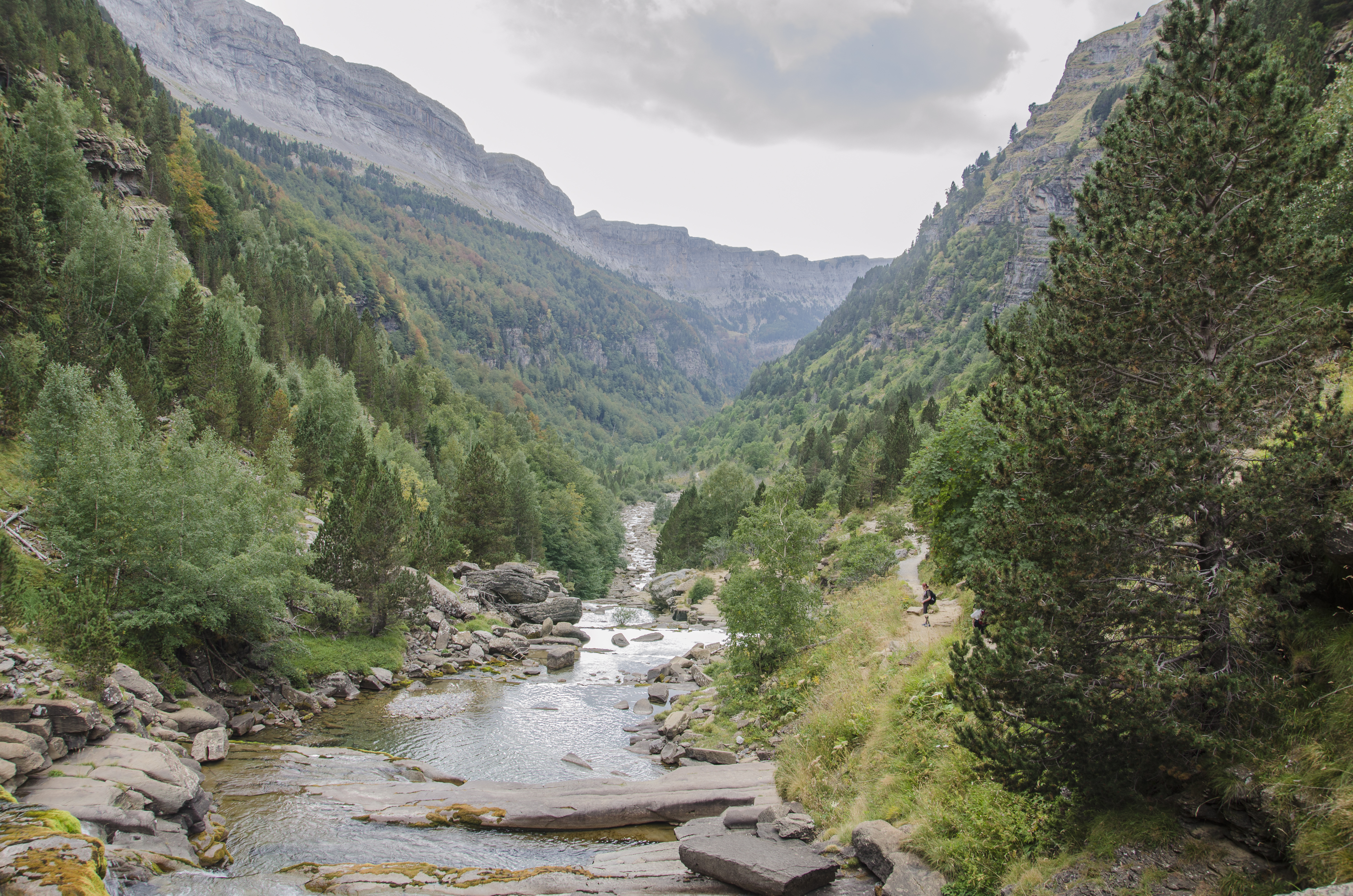 Ordesa y Monte perdido